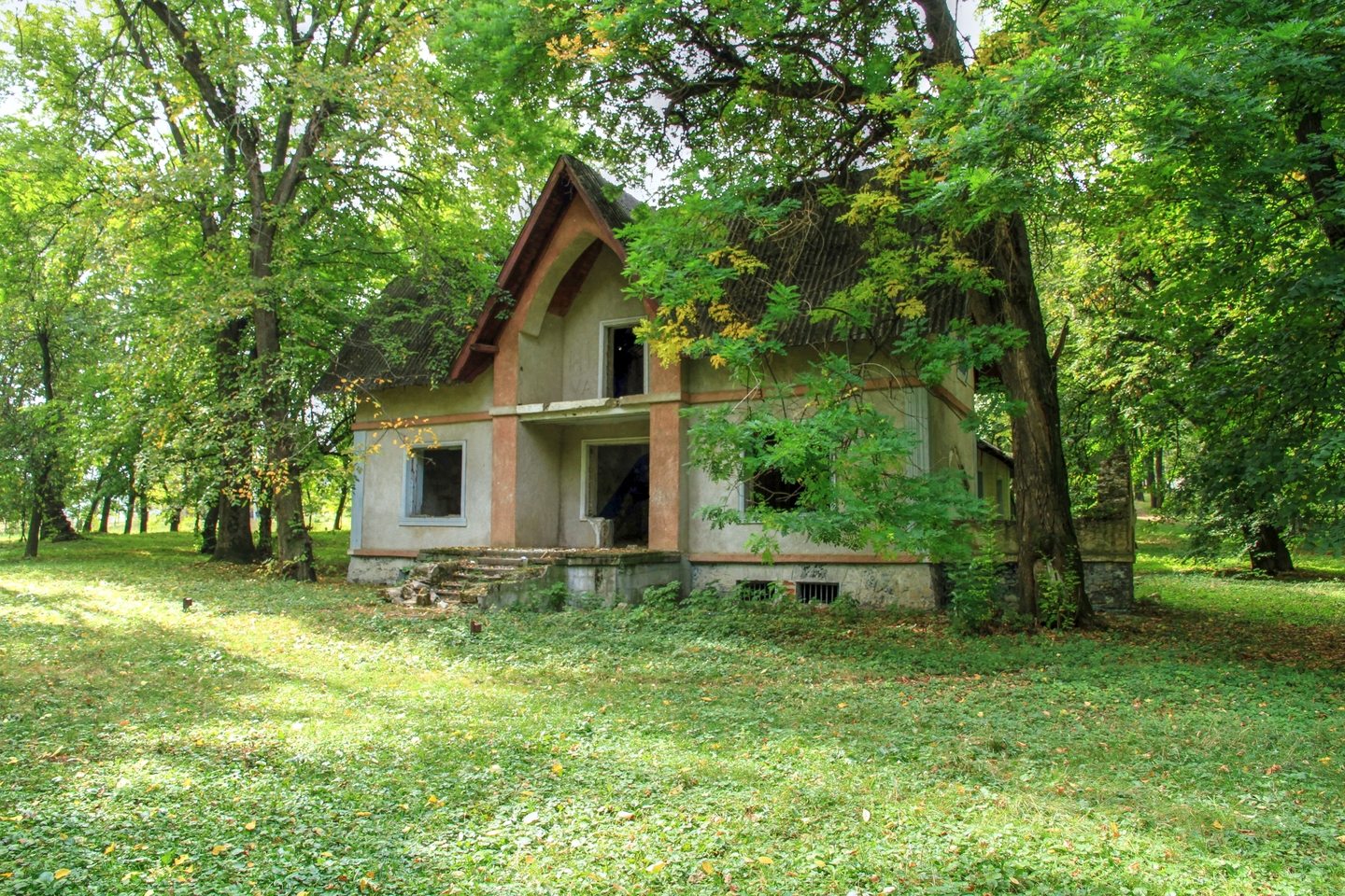 Темелеуцкий парк, монумент природы, находится в Приднестровия, Каменский район, с. Темелеуць (код MD-CC-map-005)